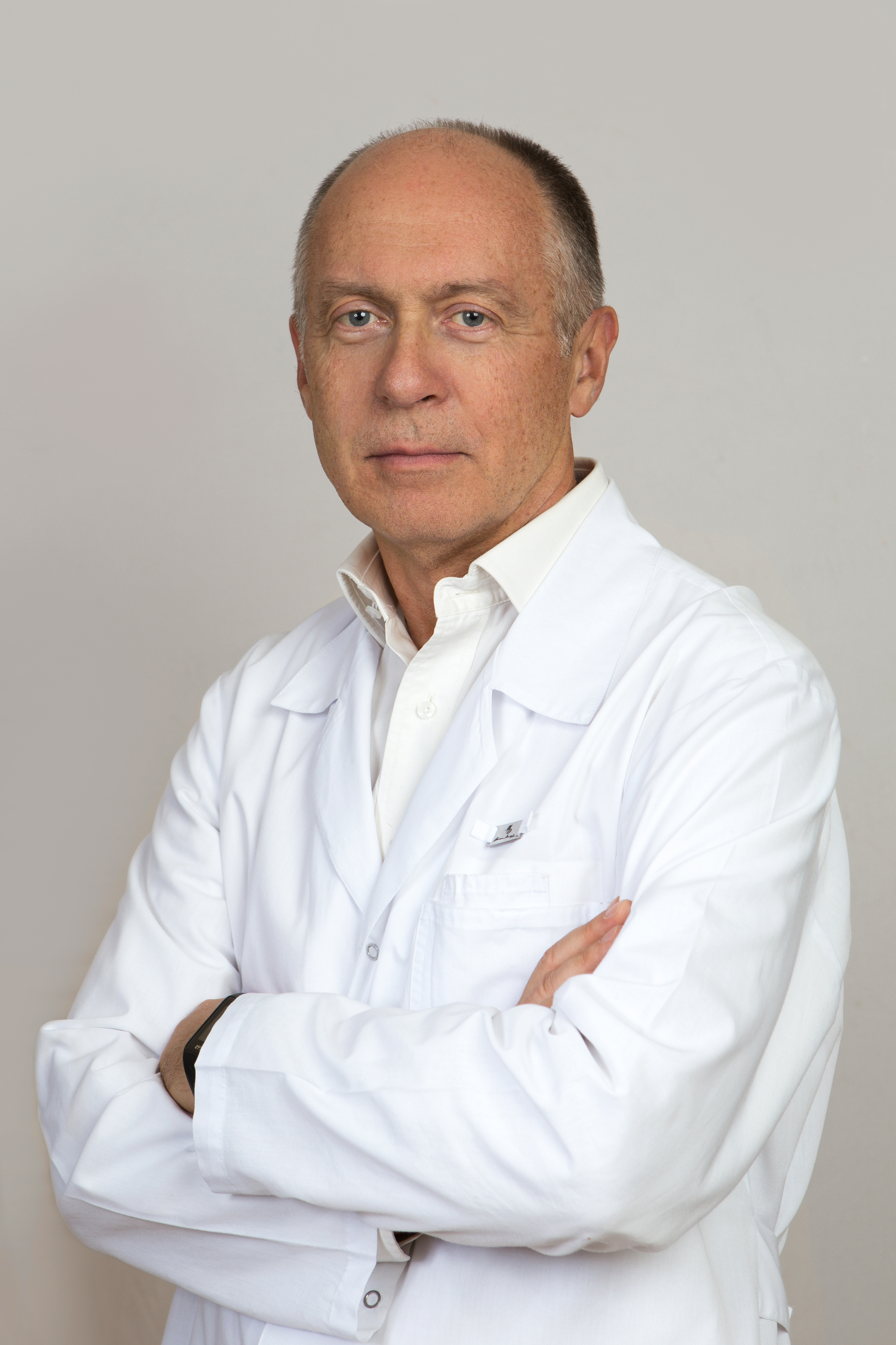 Трубилин Владимир Николаевич